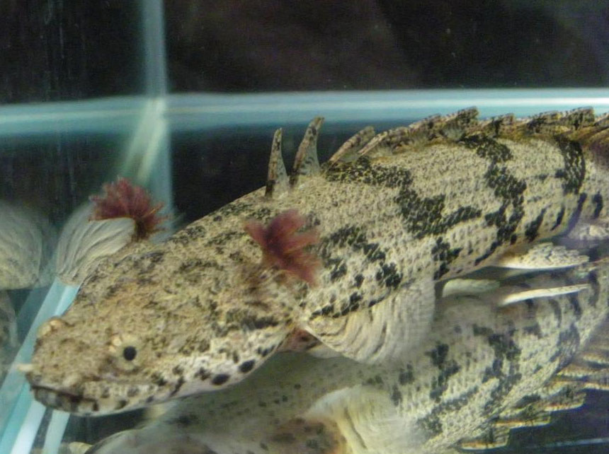 ポリプテルスエンドリケリーエンドリケリーの幼魚※ブリード個体